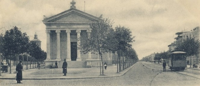 Bucureşti